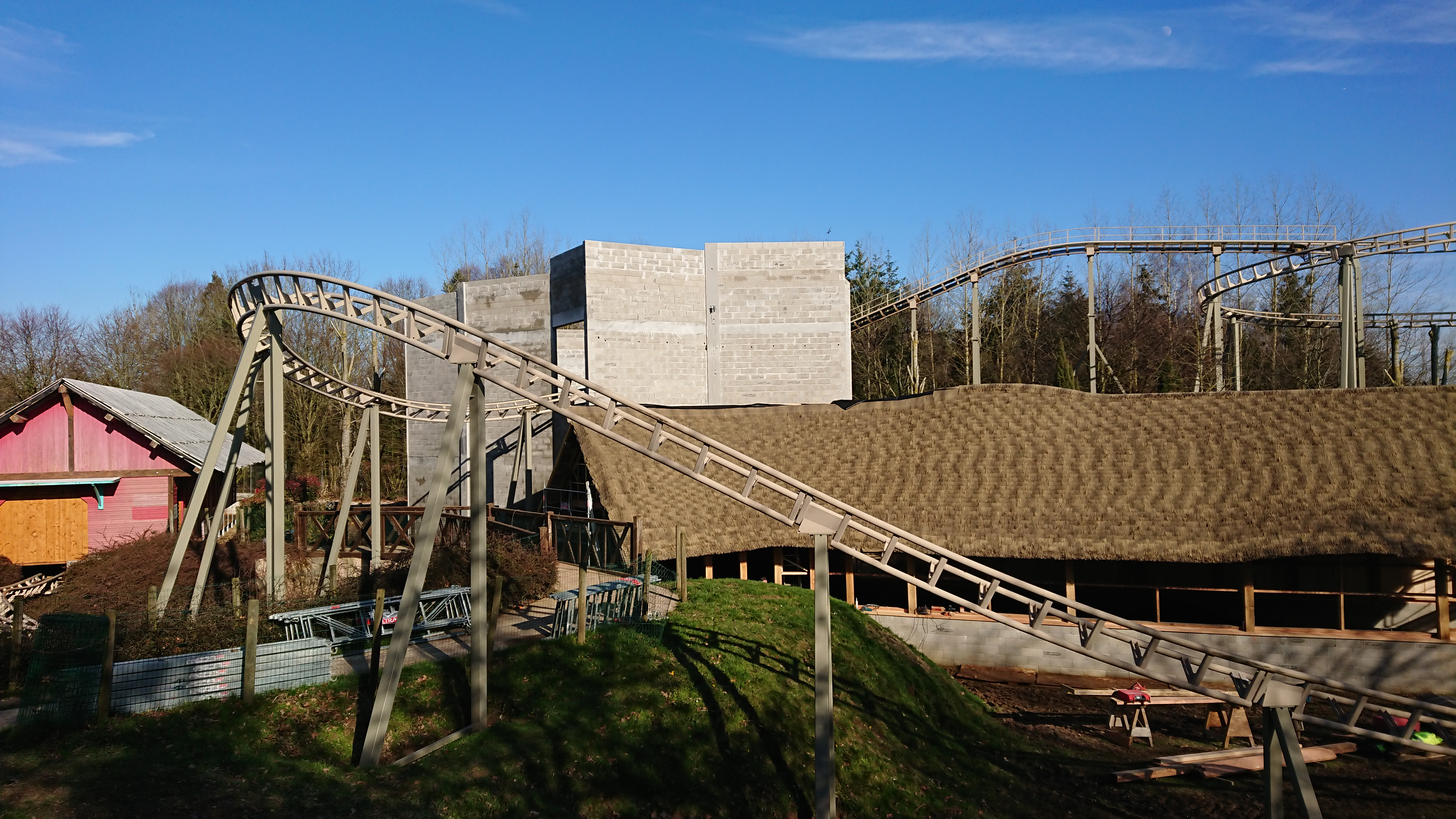 Le Fort d'Odin en chantier en février 2019.